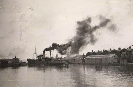 Humber Dock (1952)